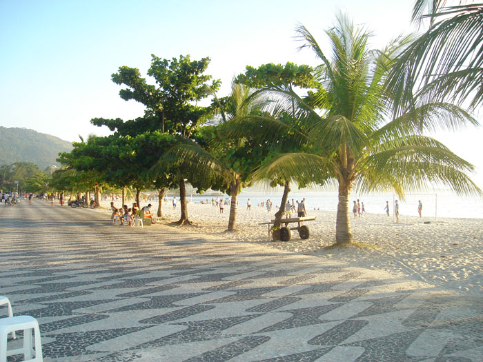 Calçadão da praia de São Francisco, Niterói, RJ, Brasil.